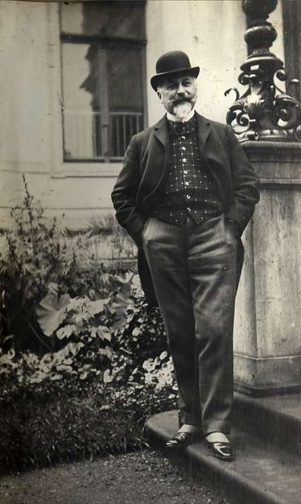 Буксгевден, Карл Карлович (1856 - 1935), русский дипломат